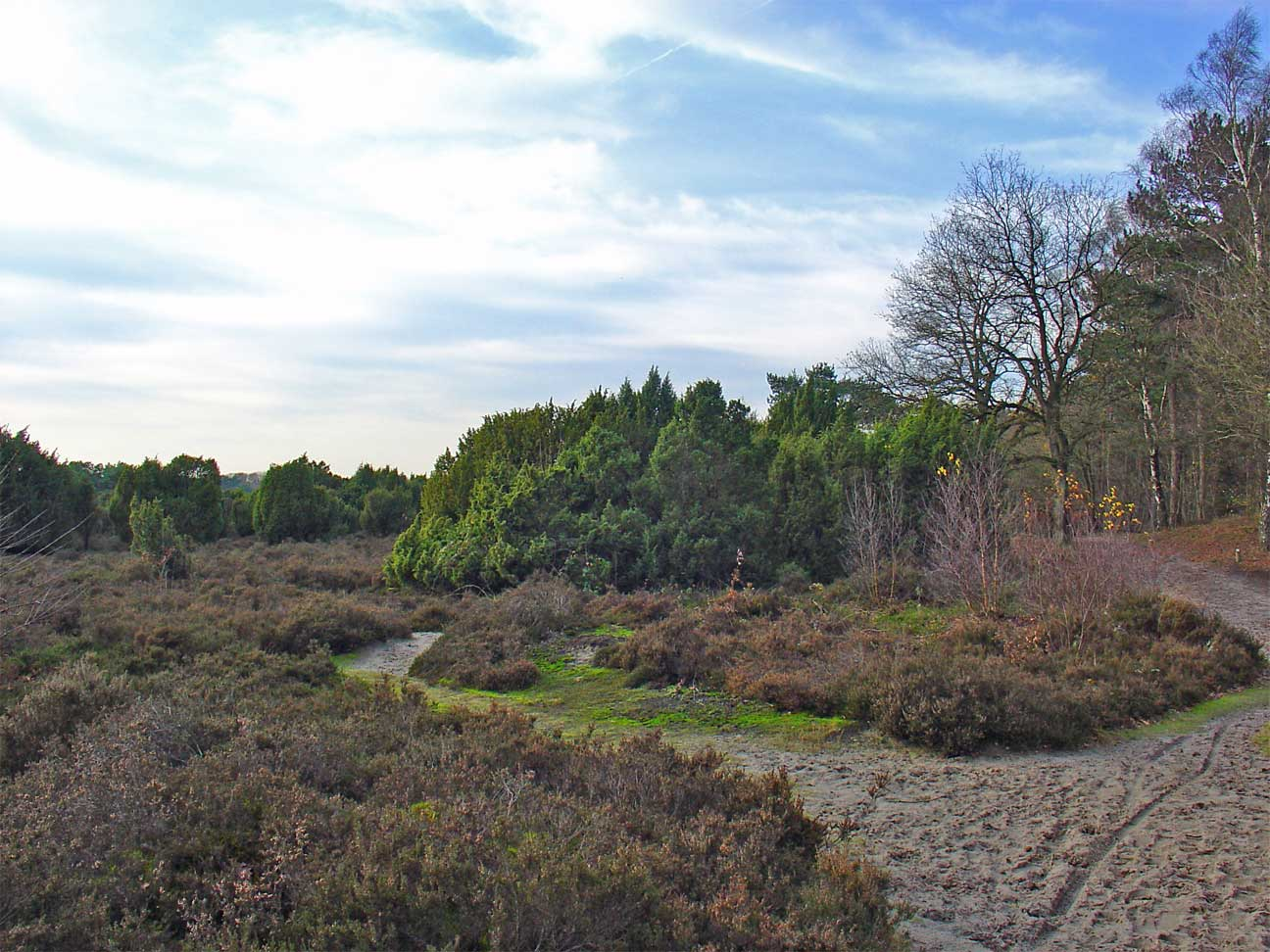 Het Terhorsterzand nabij Beilen in Drenthe